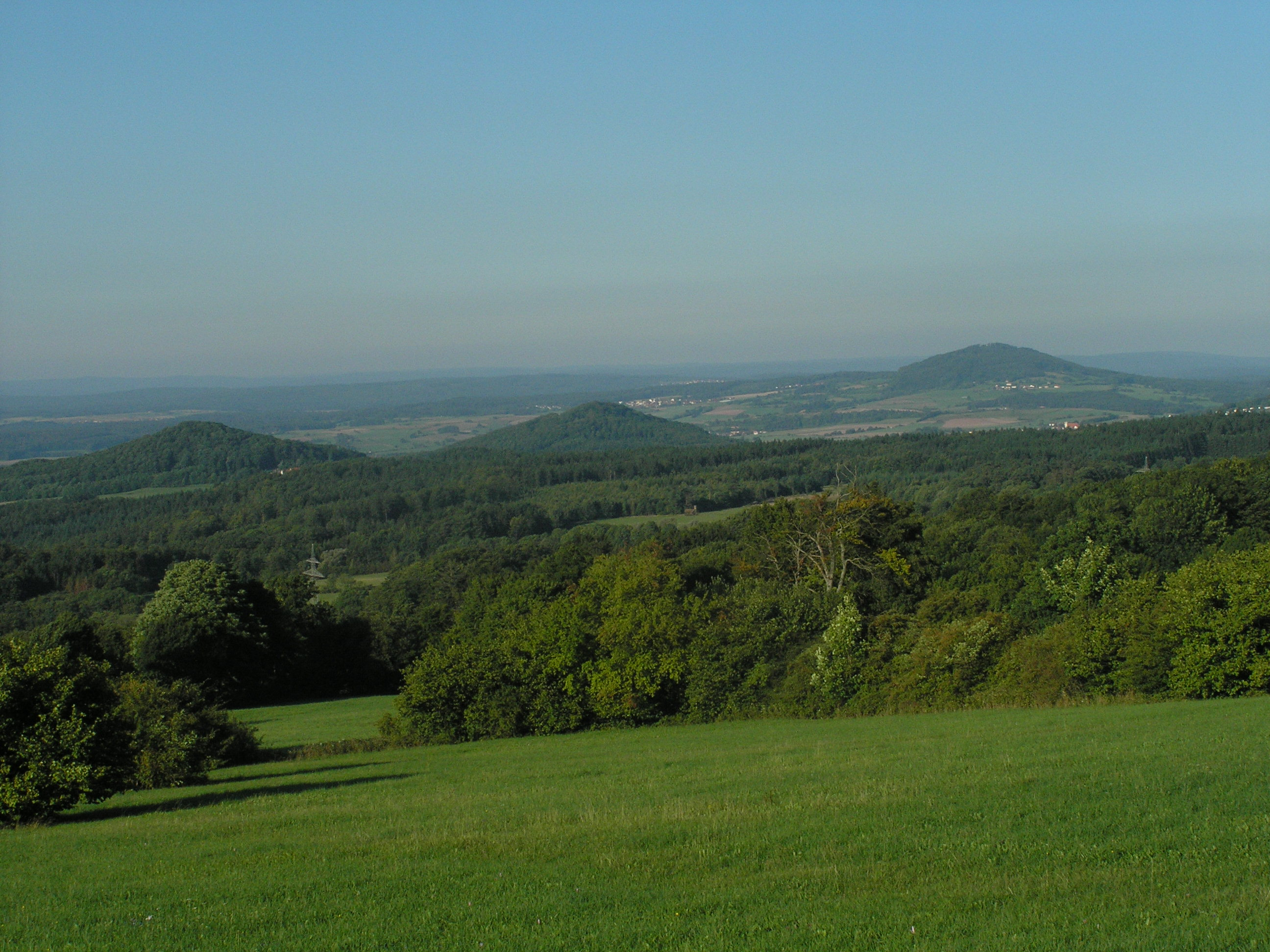 Drei Rhöner Basaltkegel der Brückenauer Kuppenrhön - links der Schildeck, mittig der Mettermich und rechts der Dreistelz